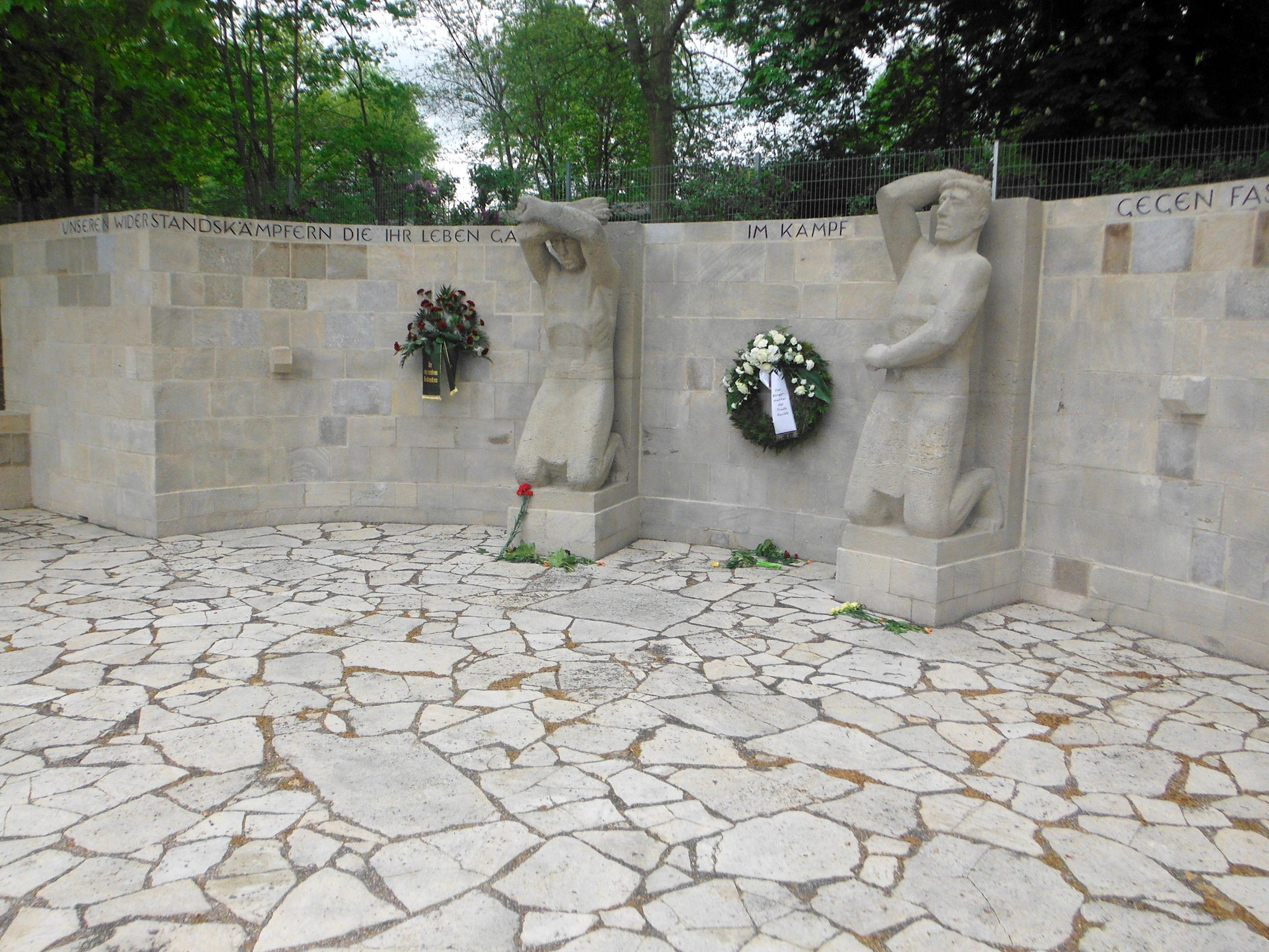 Mahnmal für die Opfer des Faschismus Apolda nach der Restaurierung 2016